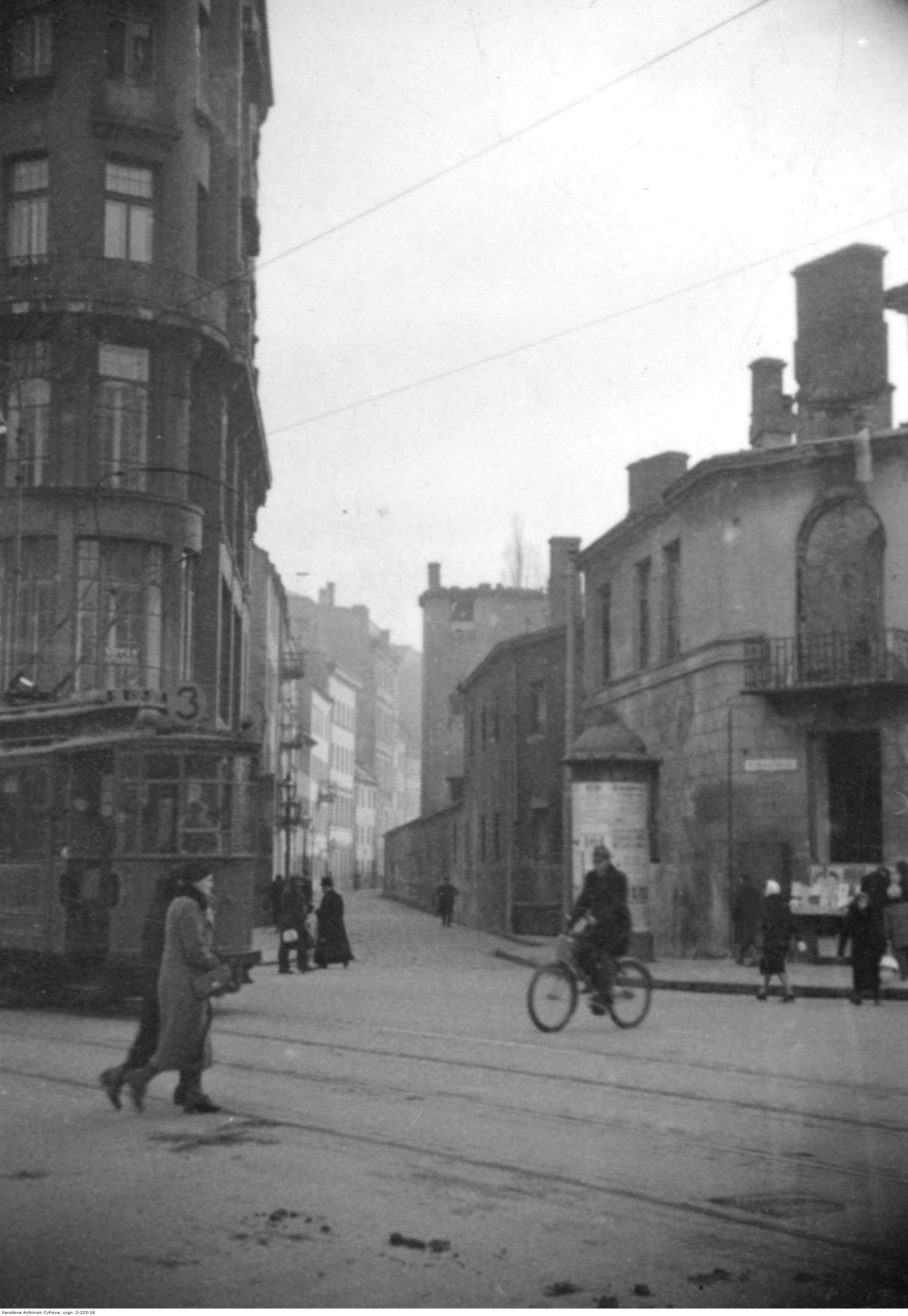 Skrzyżowanie ul. Miodowej i Koziej. Widoczny tramwaj nr 3.